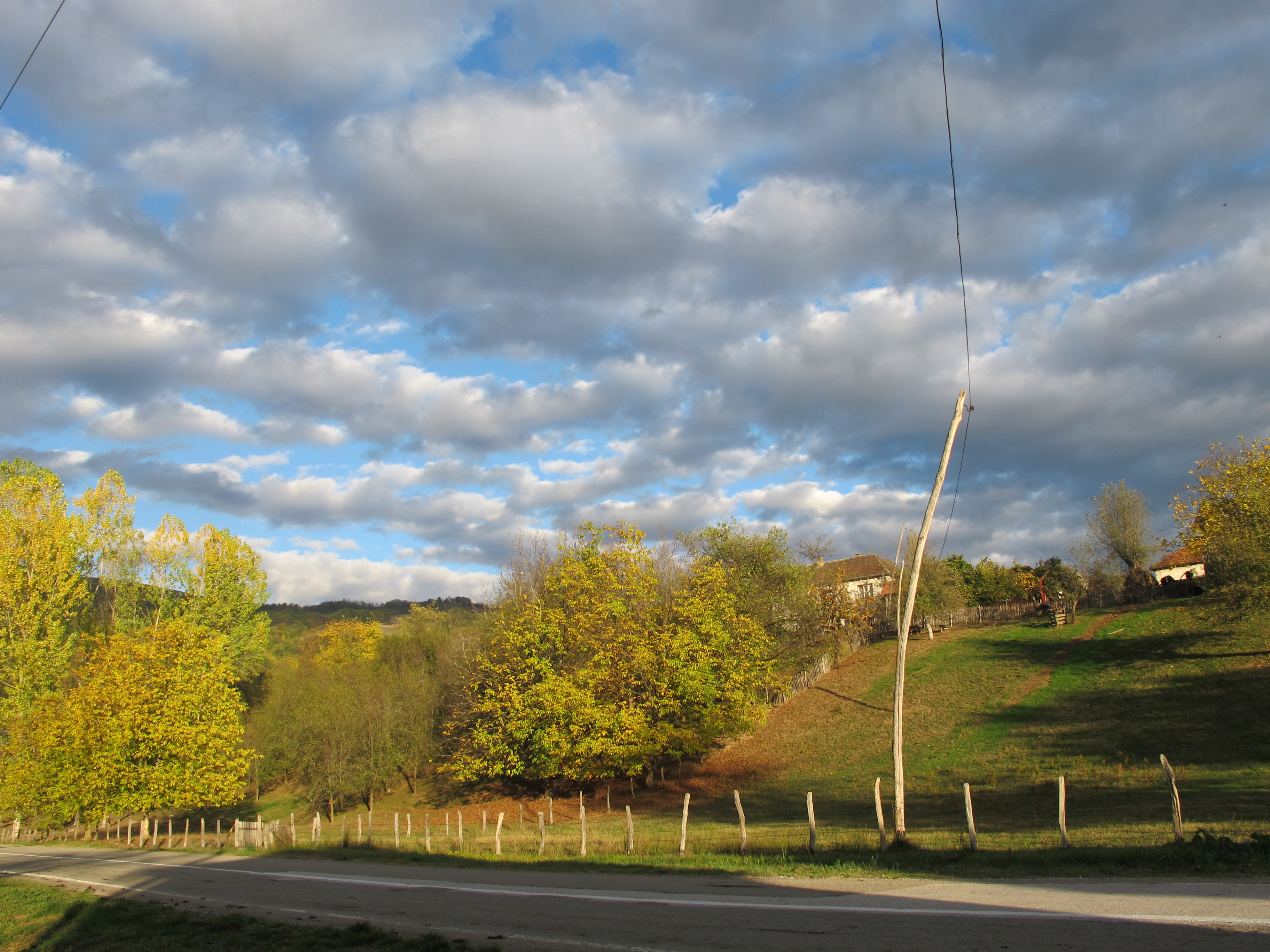 Дрлаче.